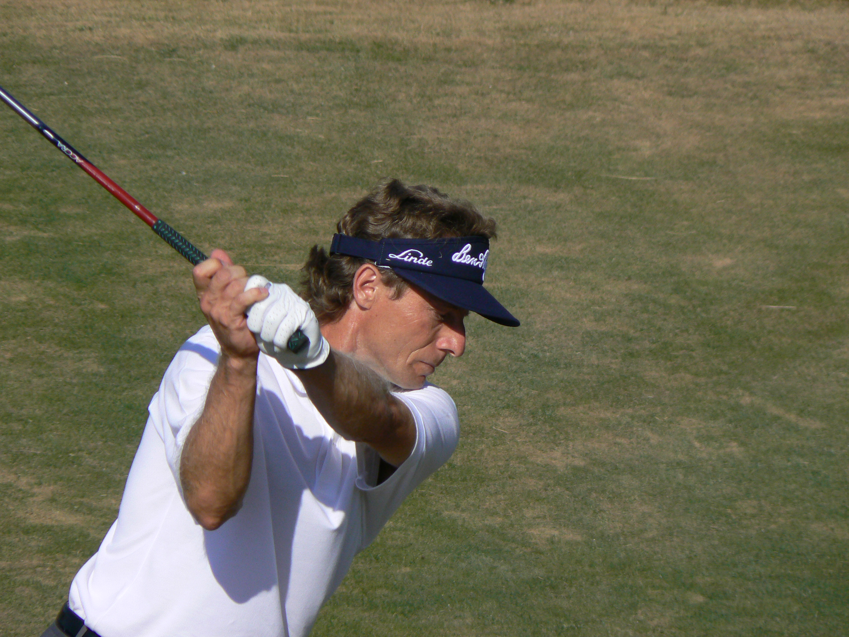 Bernhard Langer, German golfer